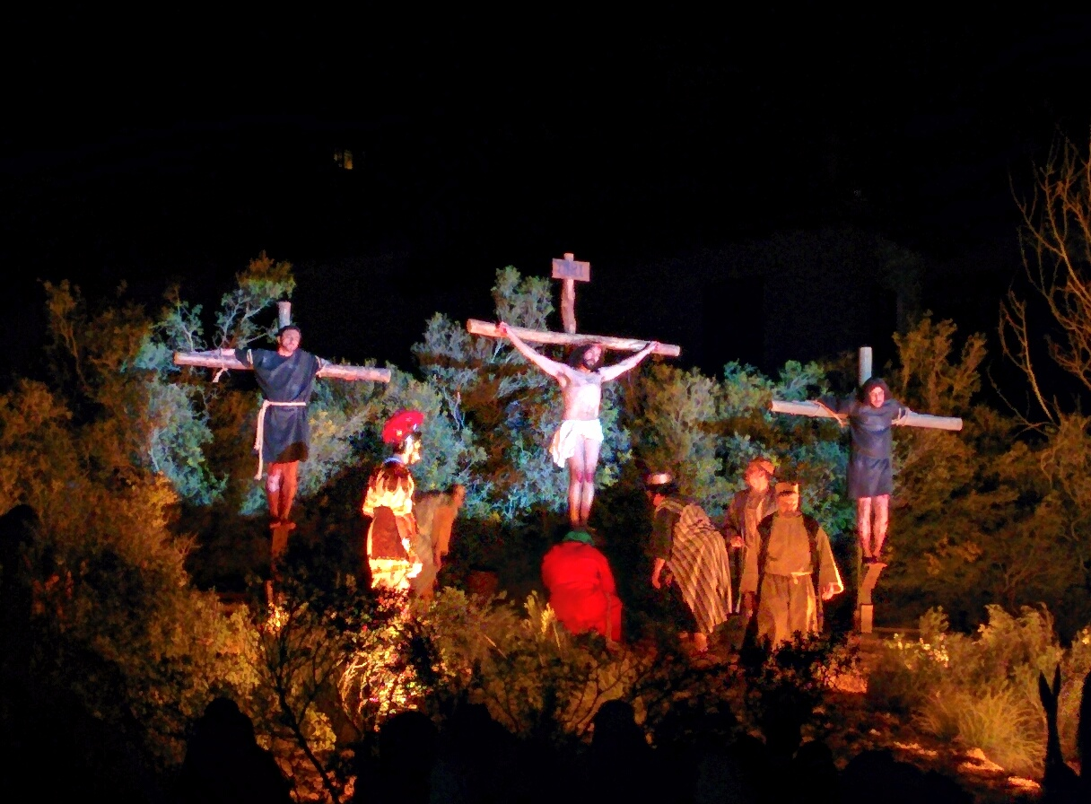 Pasión Viviente de Chinchón 2016. This is a photography of a Folklore festival in Spain (Wikidata id Q23452661).